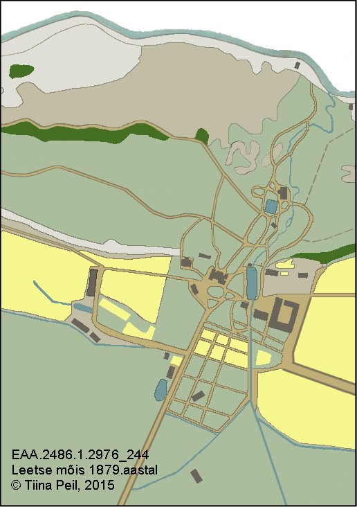 Leetse mõisa plaan